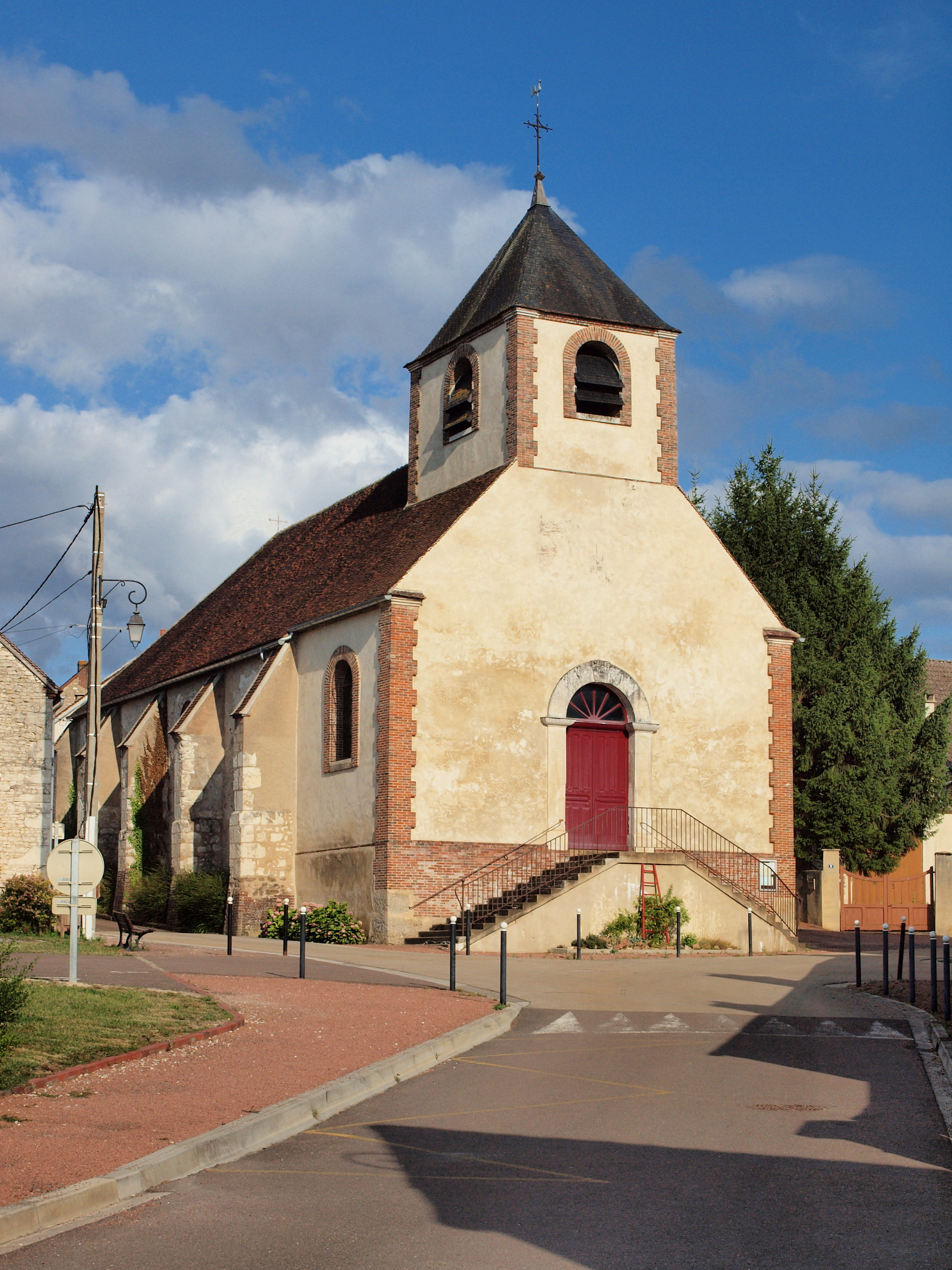 Villemer (Yonne, France)